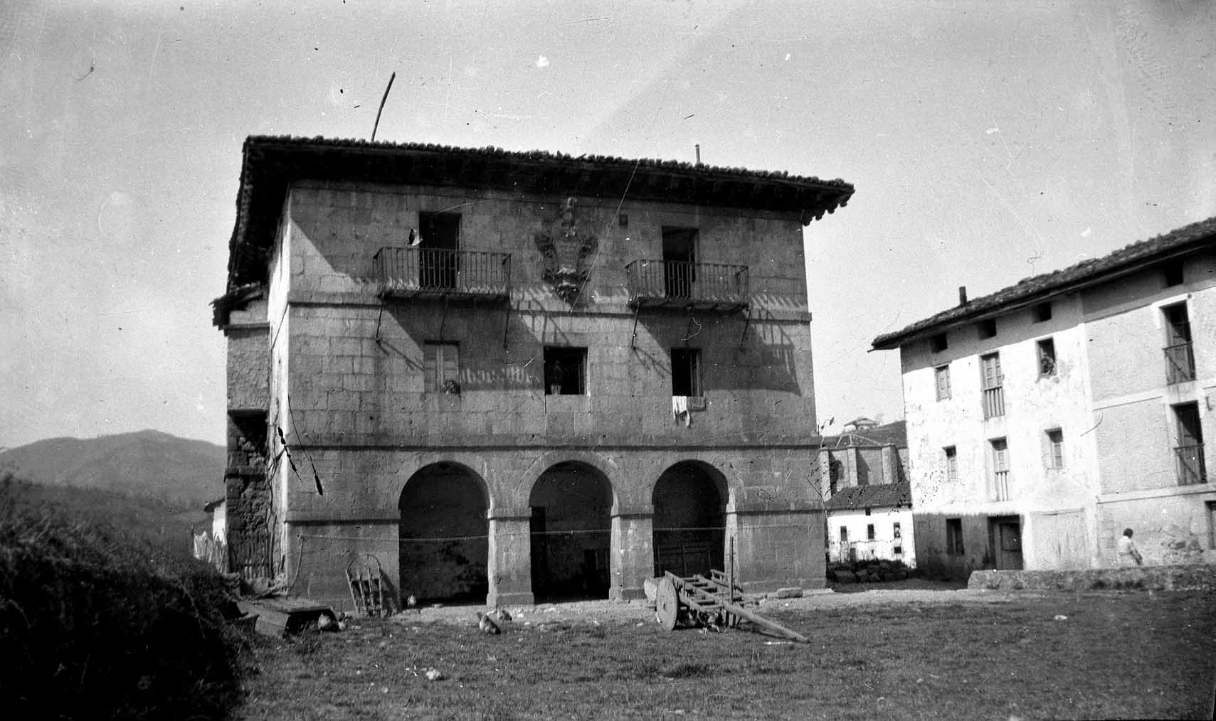 Zizurkilgo udaletxea 1945